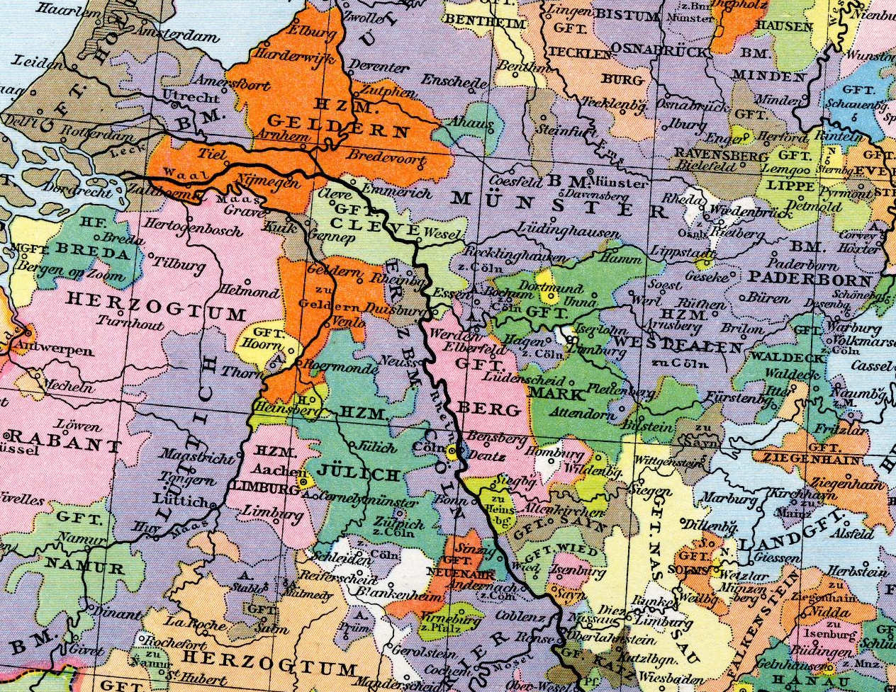 Deutschland im 14. Jahrhundert, Ausschnitt (a smaller cut of the map)